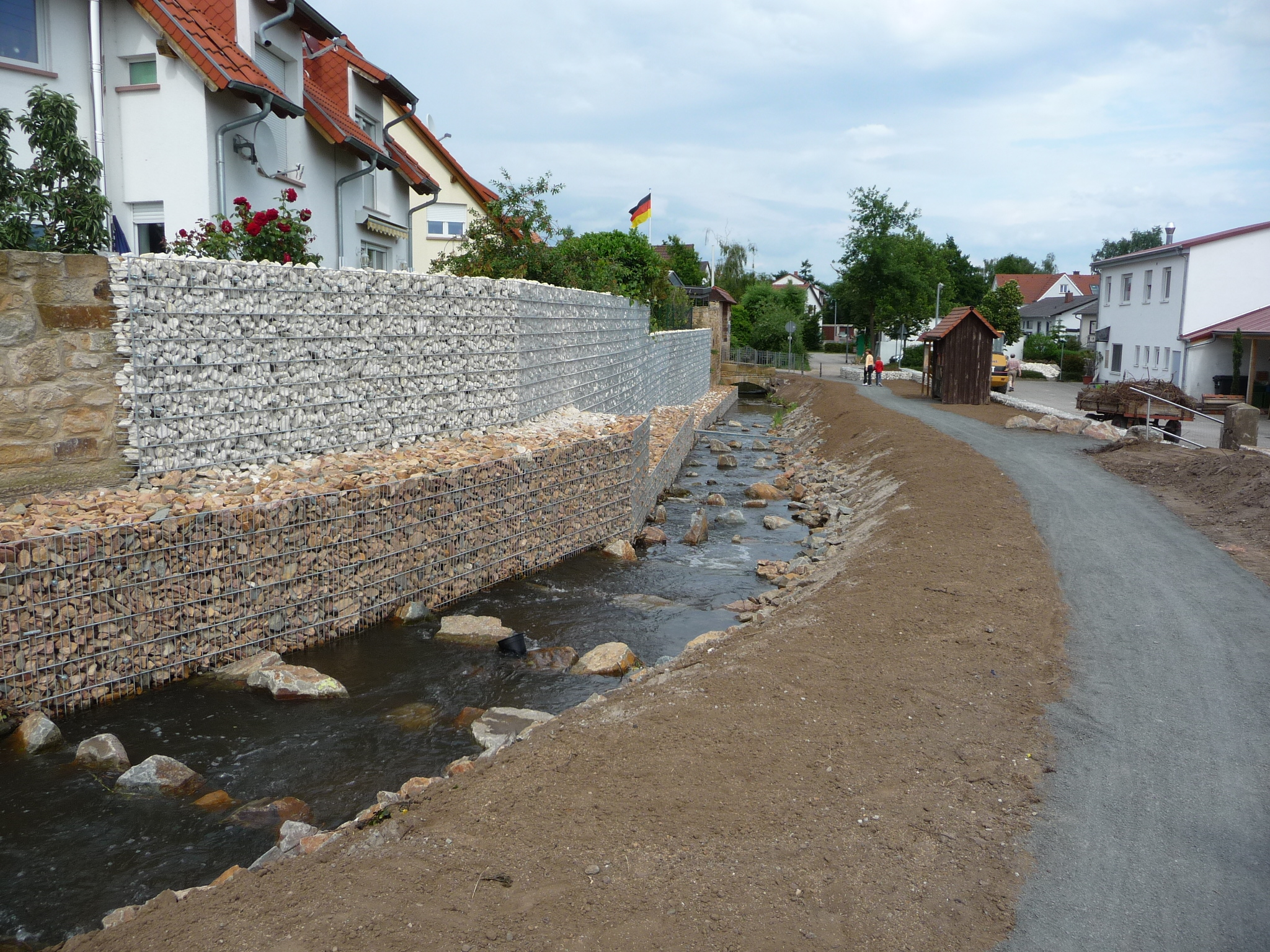 Erpolzheim ist eine Ortsgemeinde im Landkreis Bad Dürkheim in Rheinland-Pfalz.